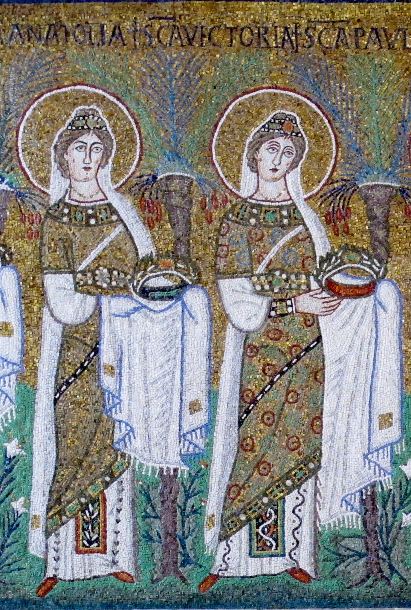 Basilica di Sant'Apollinare Nuovo - MIBAC - Santa Anatolia e Santa Vittoria This is a photo of a monument which is part of cultural heritage of Italy.